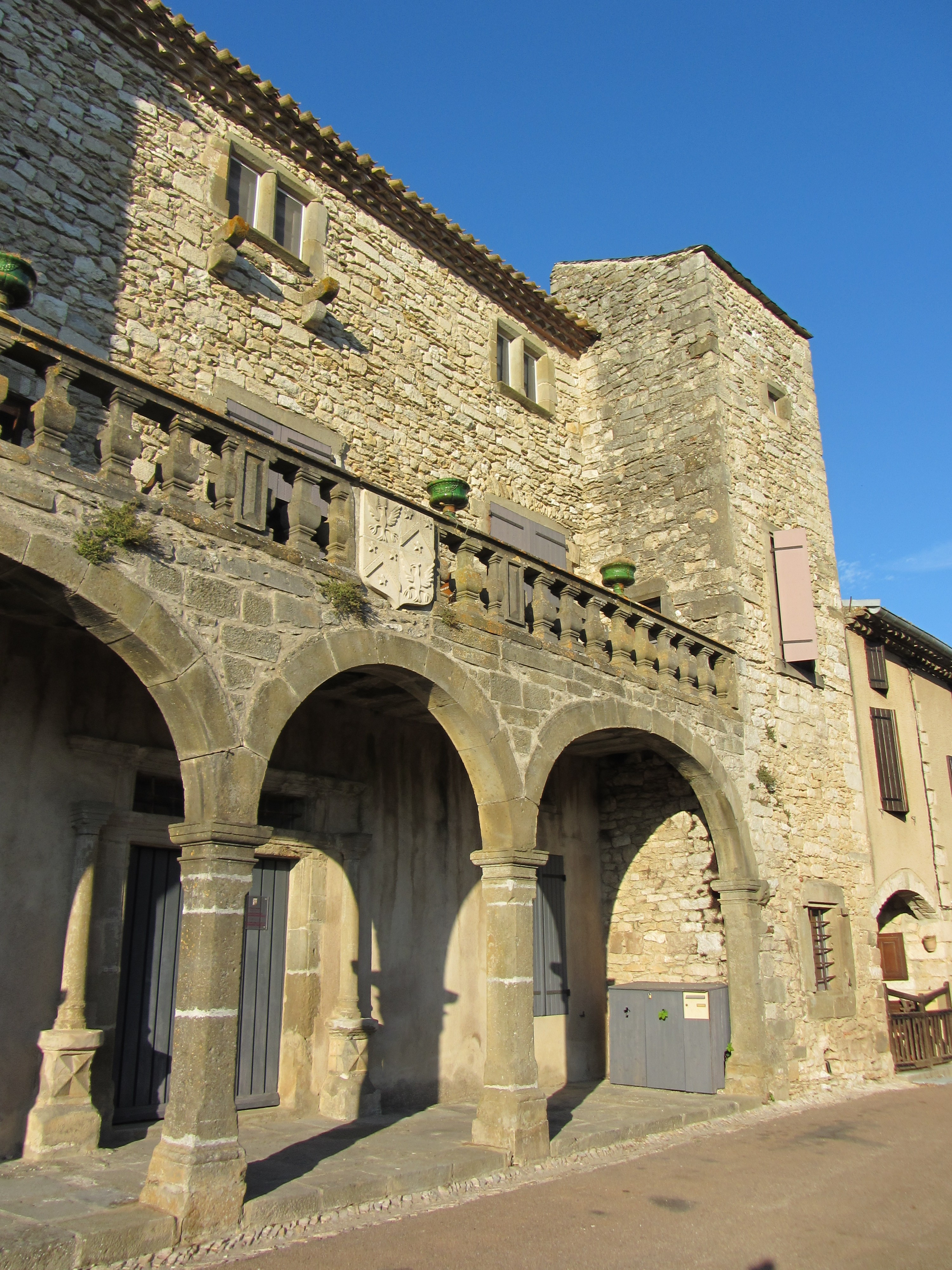 Château d'Aragon